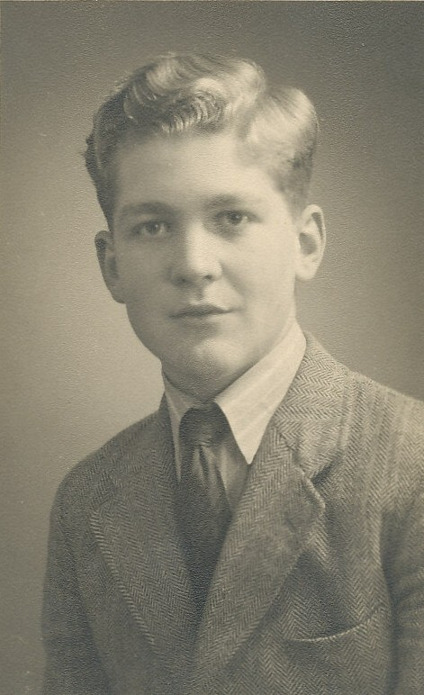 portretfoto van Ferdi Rombout in het bezit van zijn zuster E. Tummers-Rombout